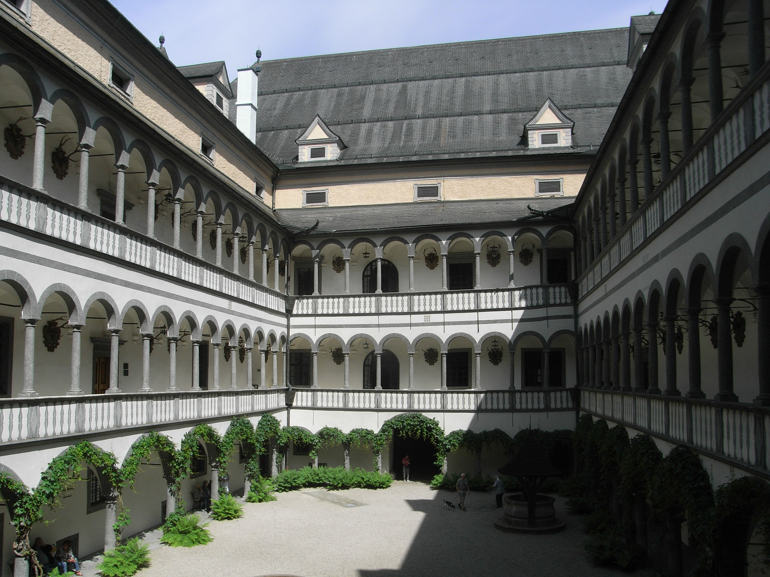 Innenhof der Greinburg.